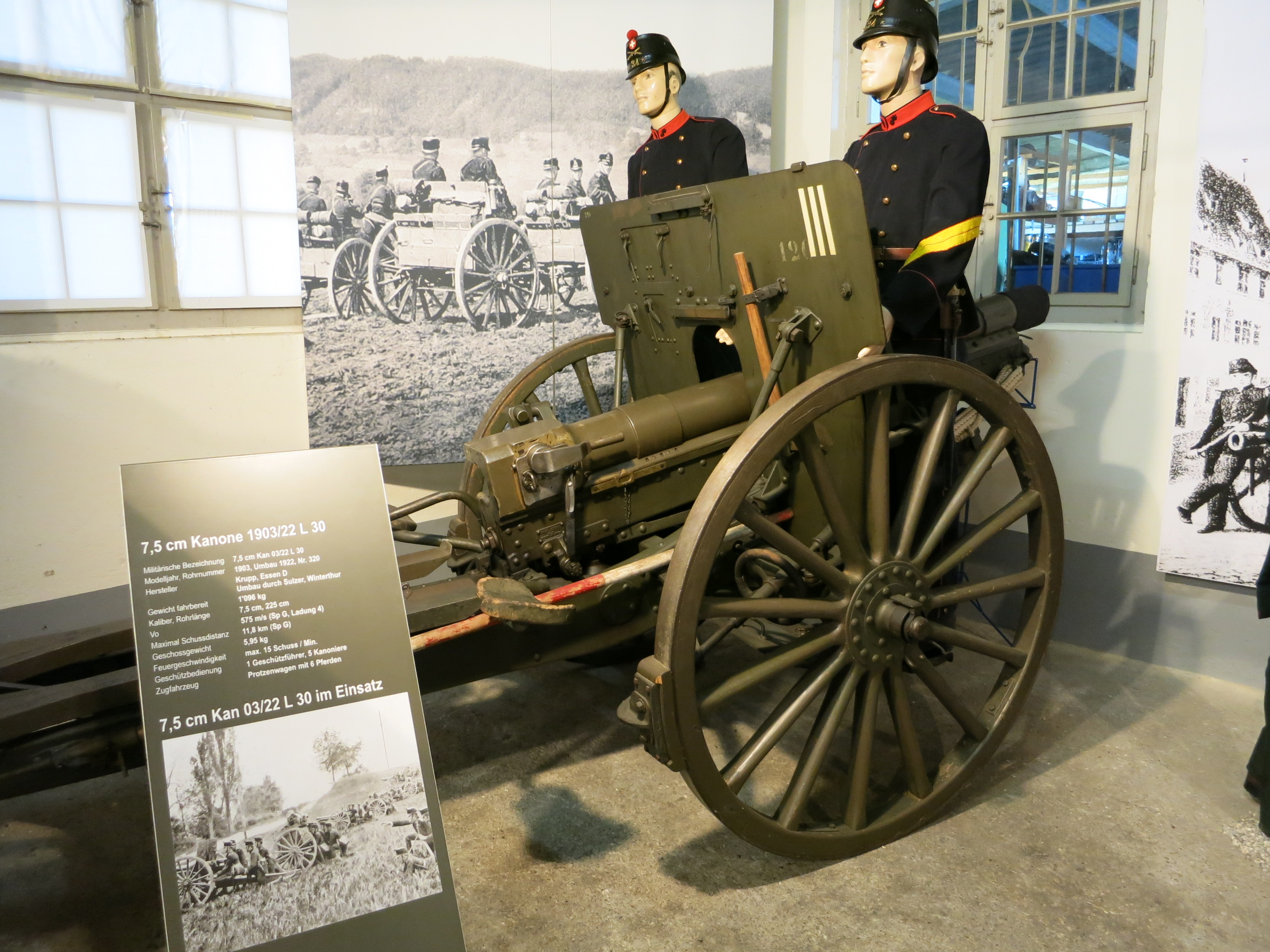 Museum im Zeughaus, Schaffhausen SH, Schweiz